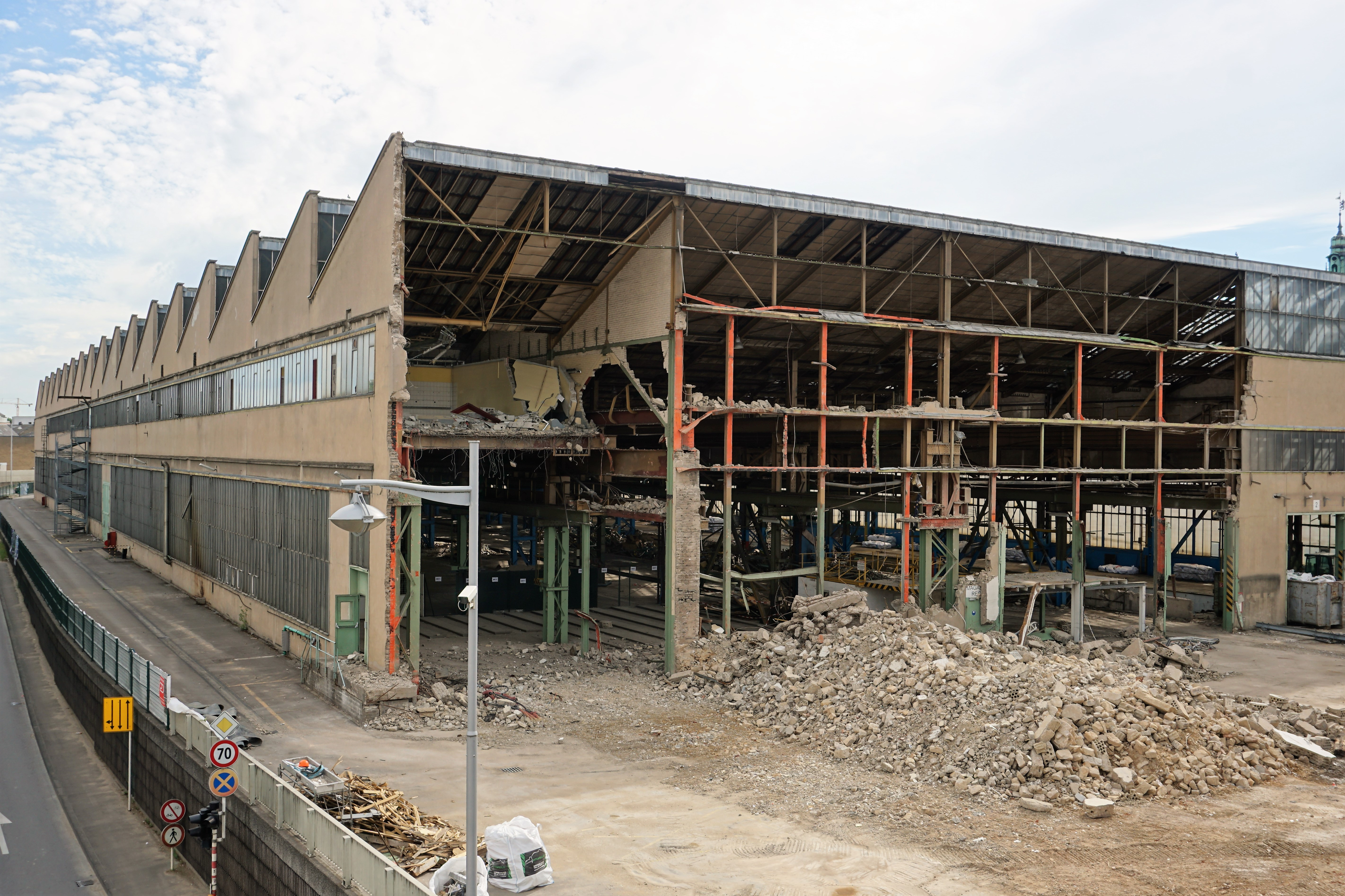 Luxembourg: démolition des anciens ateliers CFL le long de la "Rocade de Bonnevoie"